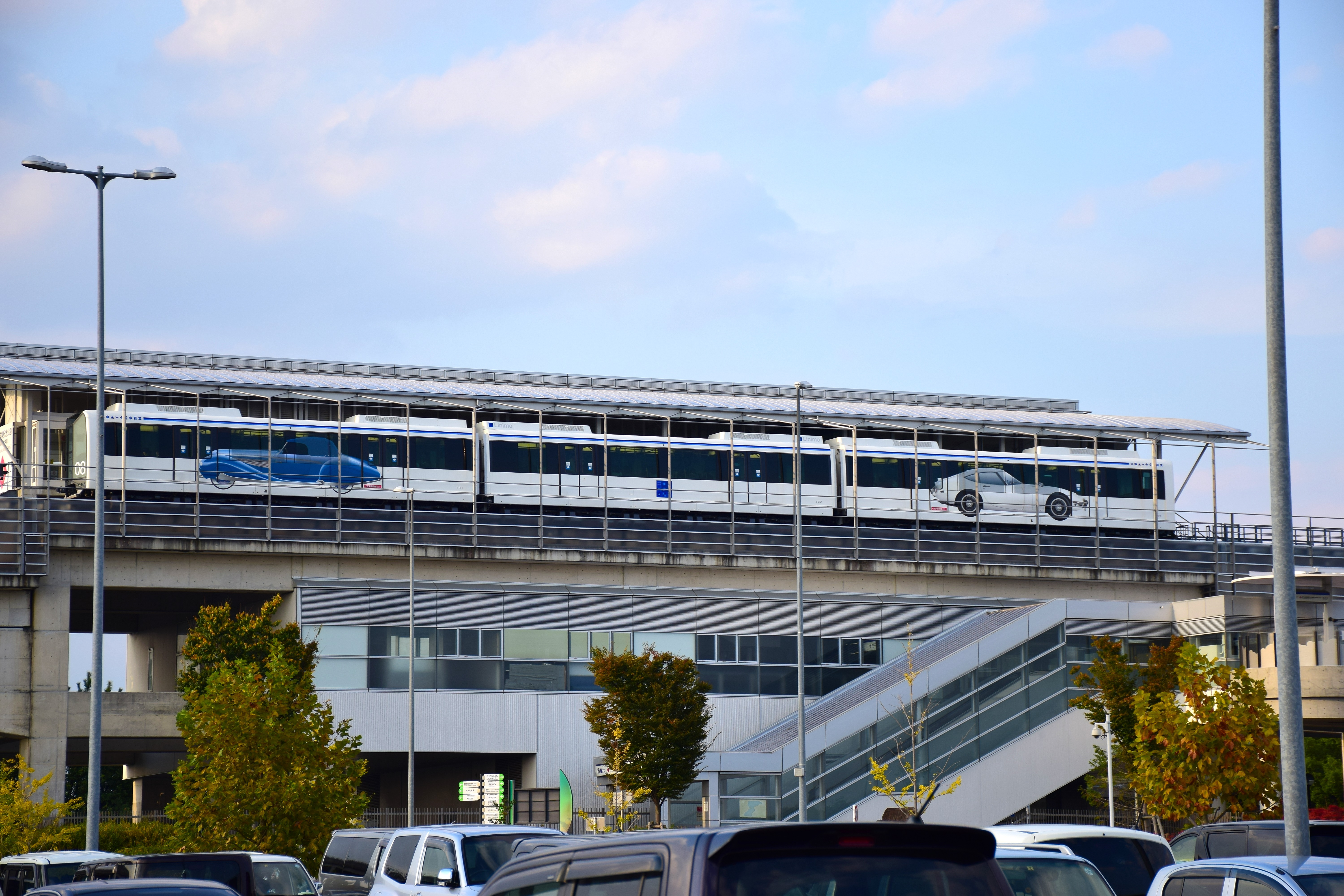 愛知高速交通東部丘陵線